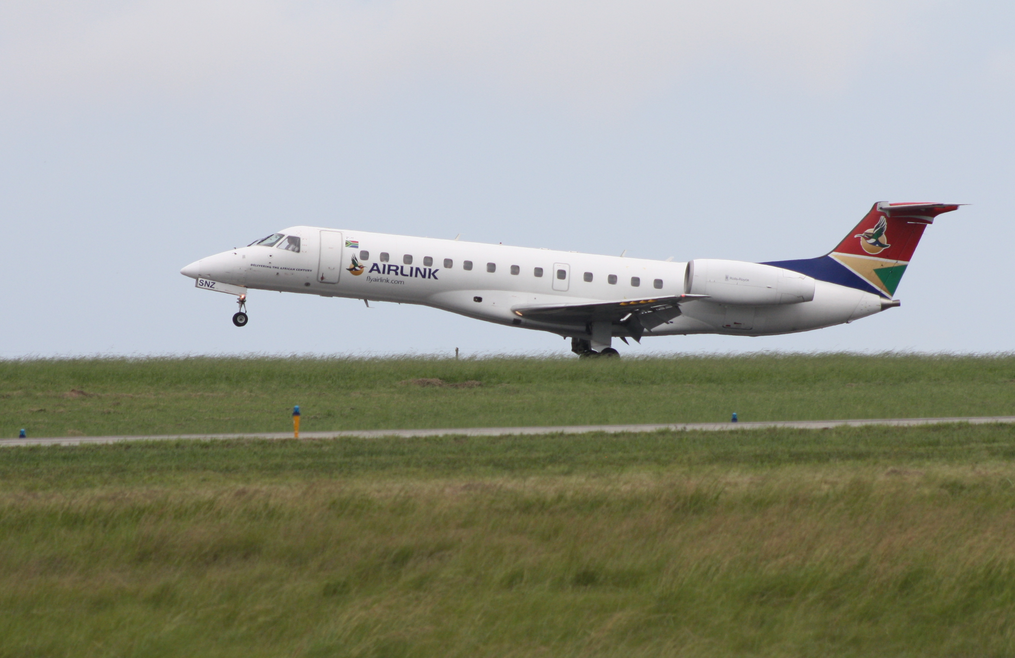 SA Airlink EMB-135 LR ZS-SNZ